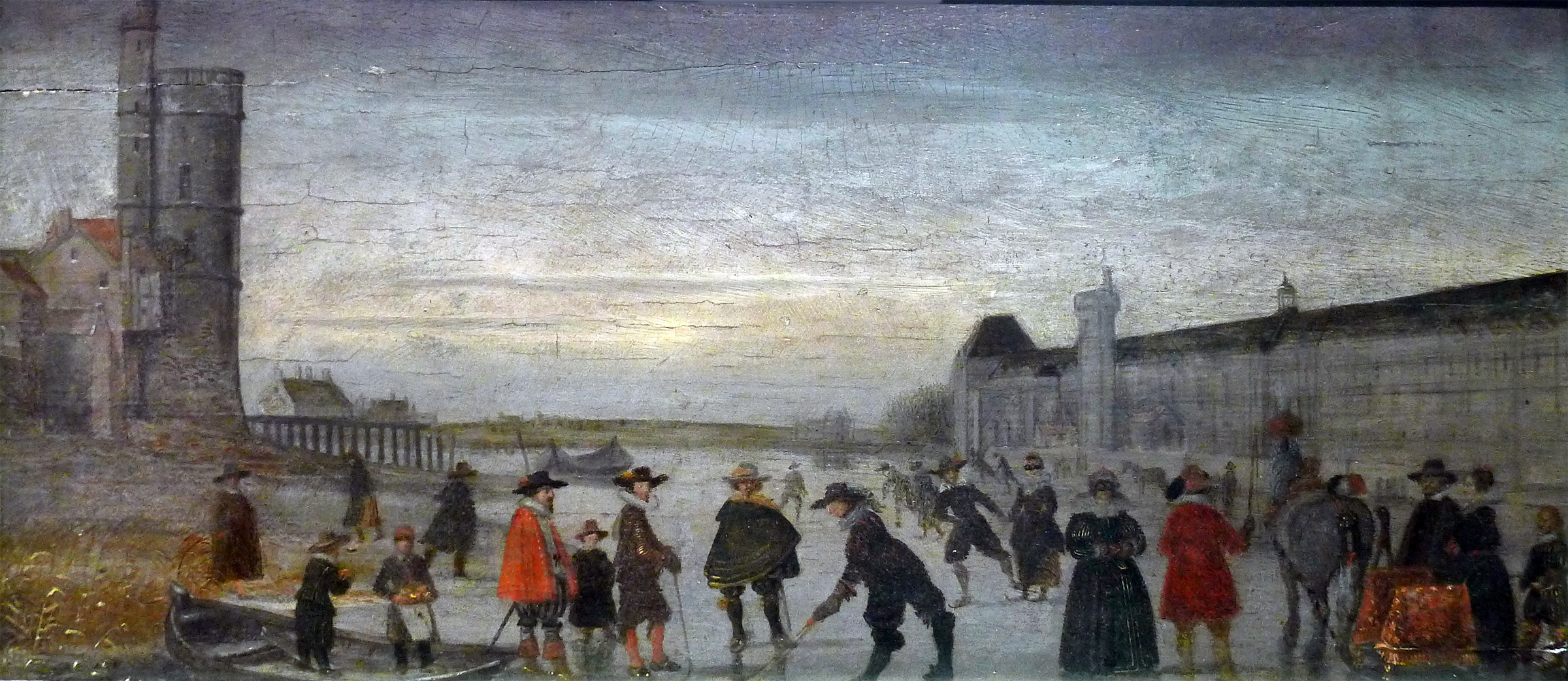 Tableau représentant une scène de la vie quotidienne des parisiens pendant l’hiver de 1607-1608, appelé le « Grand Hiver », qui dura de la mi-décembre 1607 à la mi-mars 1608 et au cours duquel la Seine fut gelée pendant plusieurs semaines. Sur ce tableau figurent, à gauche, l’ancienne tour de Nesle érigée sous Philippe Auguste, et à droite, la tour du Bois de l’enceinte de Charles V ; derrière cette dernière apparaît la grande galerie construite à la fin du XVIe siècle.